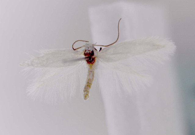 Elachista anitella